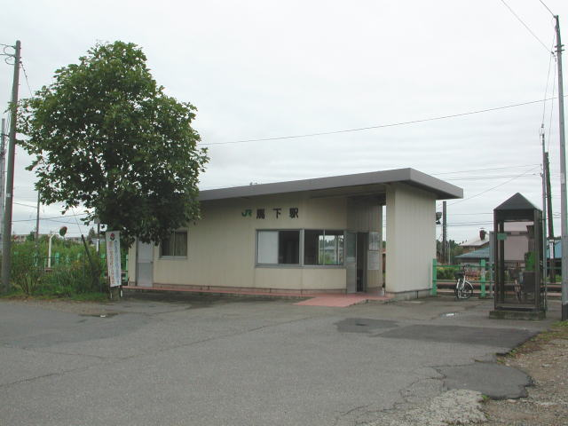 JR磐越西線 馬下駅 user:Hitam1200 2004-09-05 撮影，2004-09-05 撮影者が日本語版ウィキペディアにアップロード